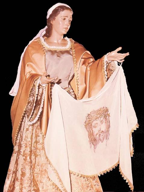 Santa Mujer Verónica, obra de Sánchez Lozano en Beniaján (Murcia) - ESPAÑA.